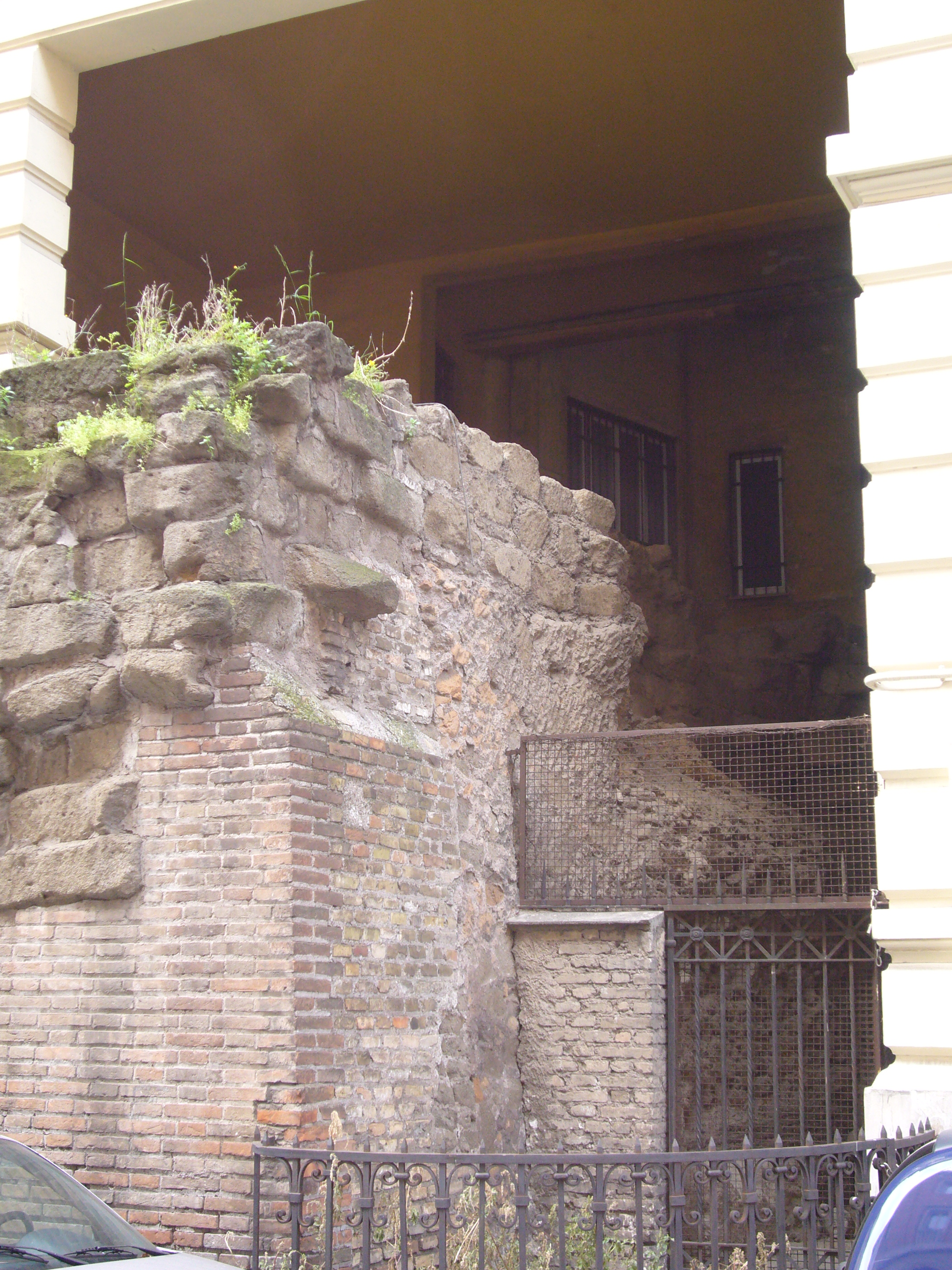 Roma, mura serviane a via Salandra angolo via Carducci